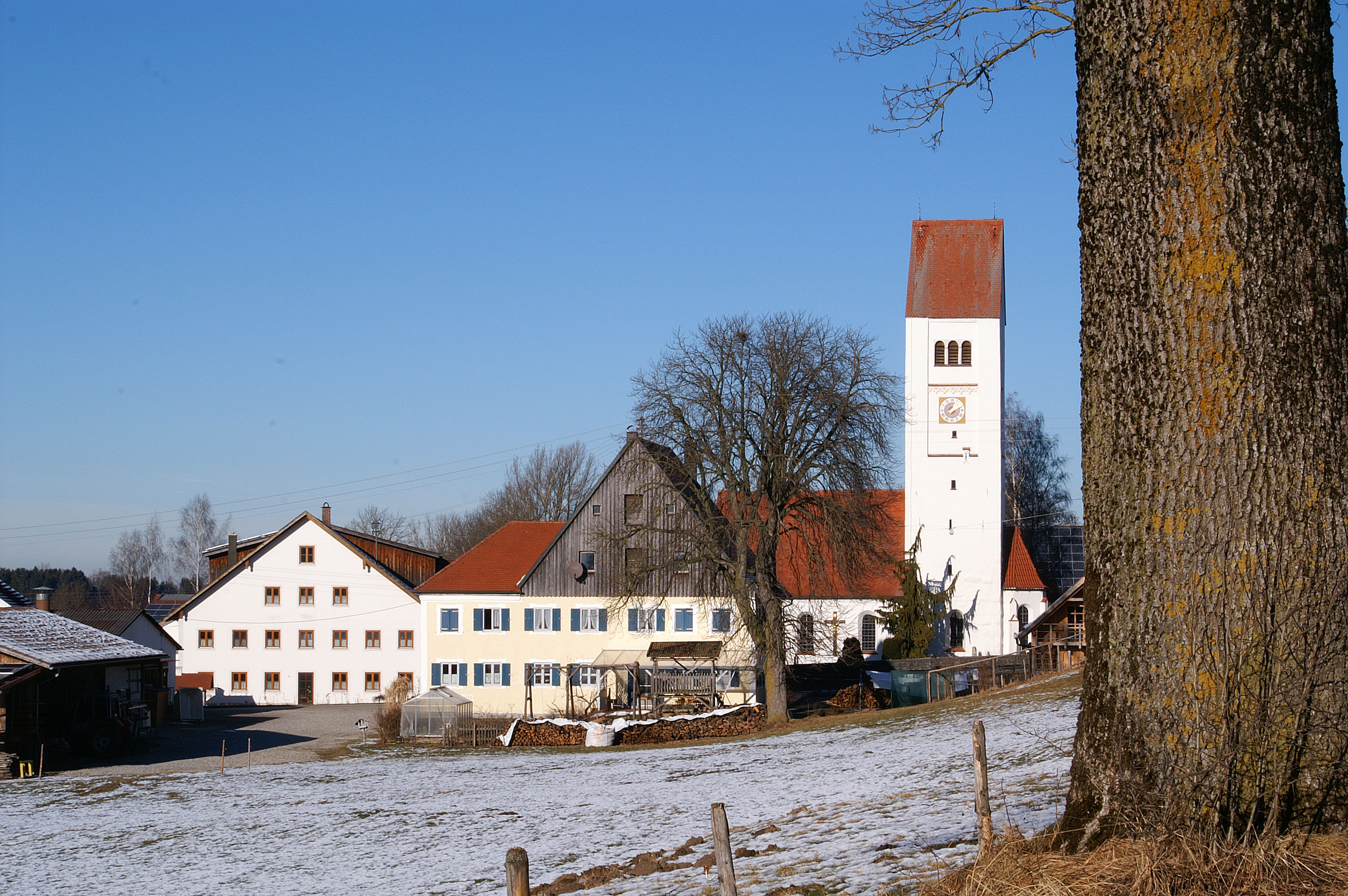 Eurishofen von Süden, Jengen